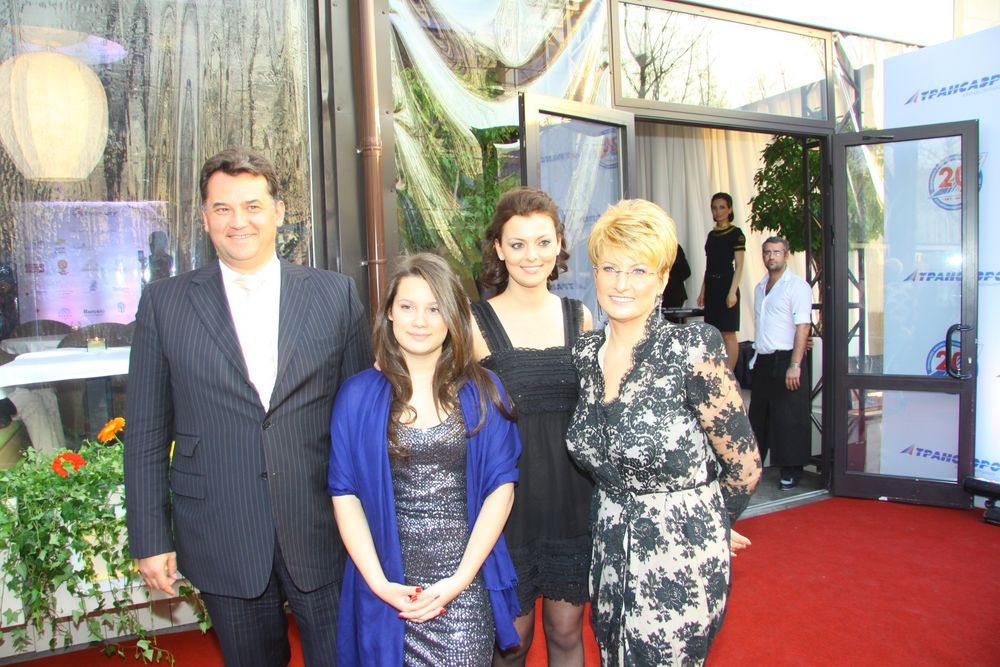 Александр, Ольга, Татьяна и Наталья Плешаковы